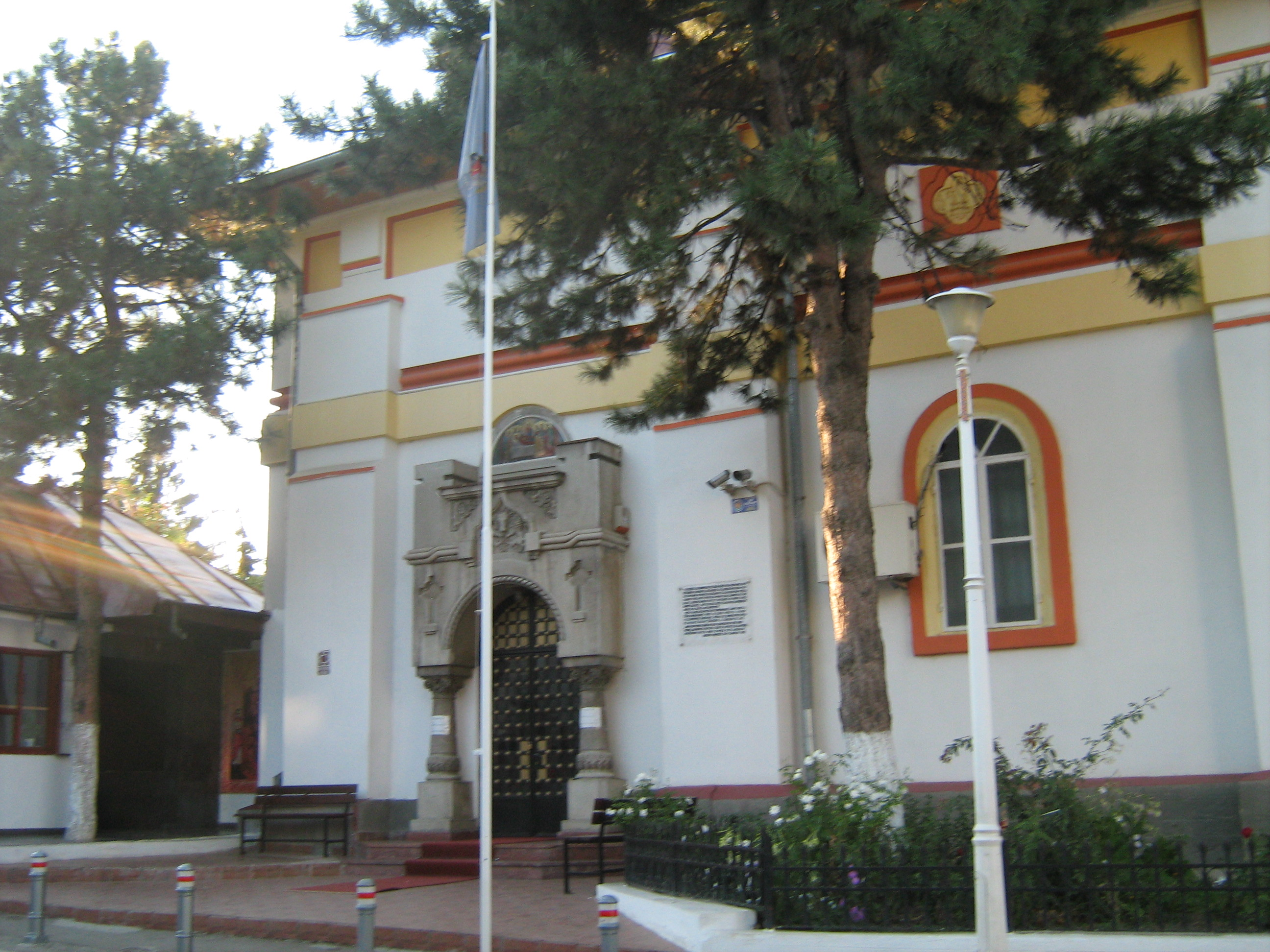 Biserica Adormirea Maicii Domnului Mavromol 01